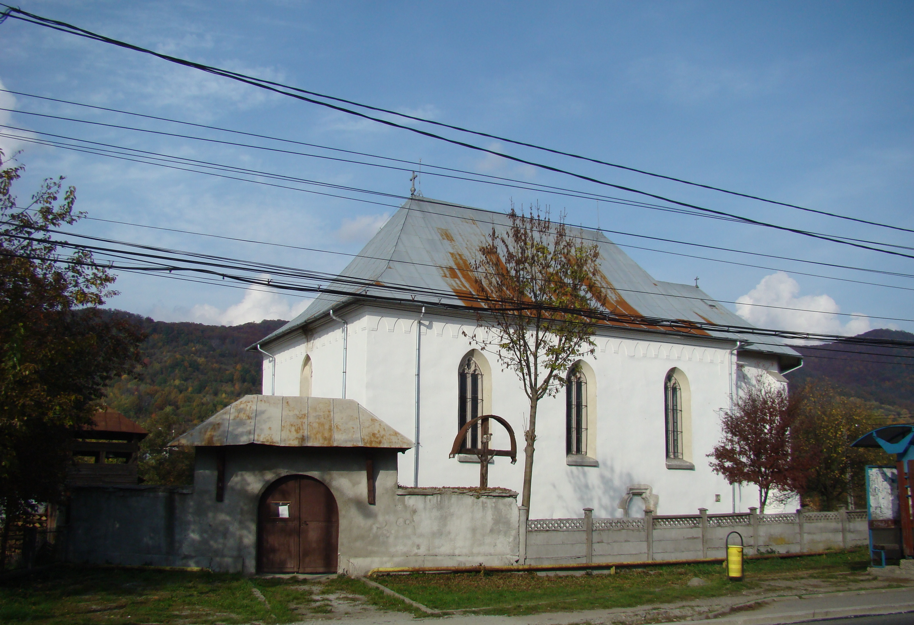 Biserica romano catolică "Tăierea Capului Sf. Ioan",sat aparținător Tăuții de Sus; oraș Baia Sprie